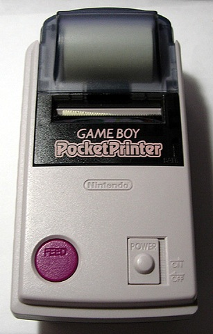 任天堂のゲームボーイ用周辺機器、「PocketPrinter」(ポケットプリンタ)、MGB-007。提供者nmaedaが撮影。